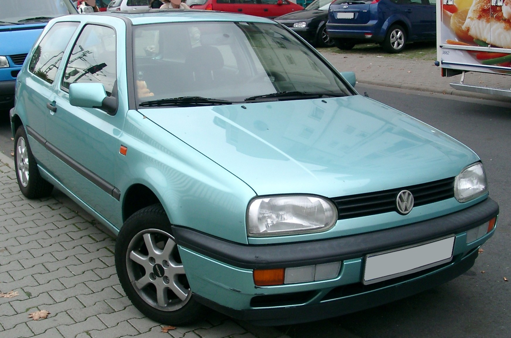 VW Golf III